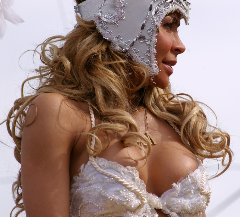 Aylín Mújica